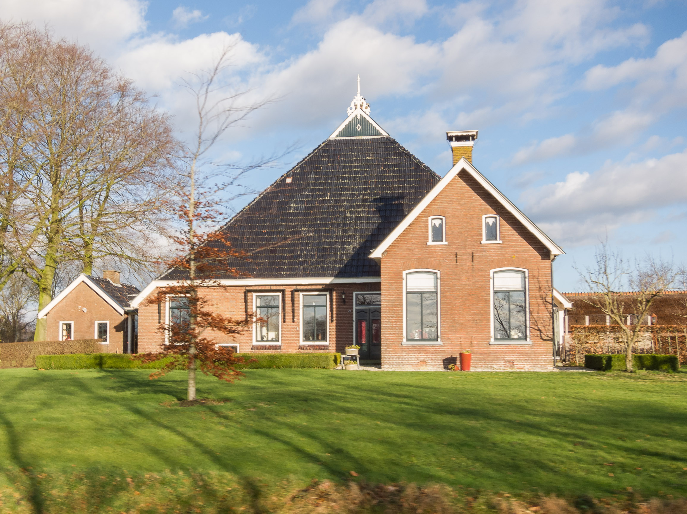 Boerderij op it Wytfean